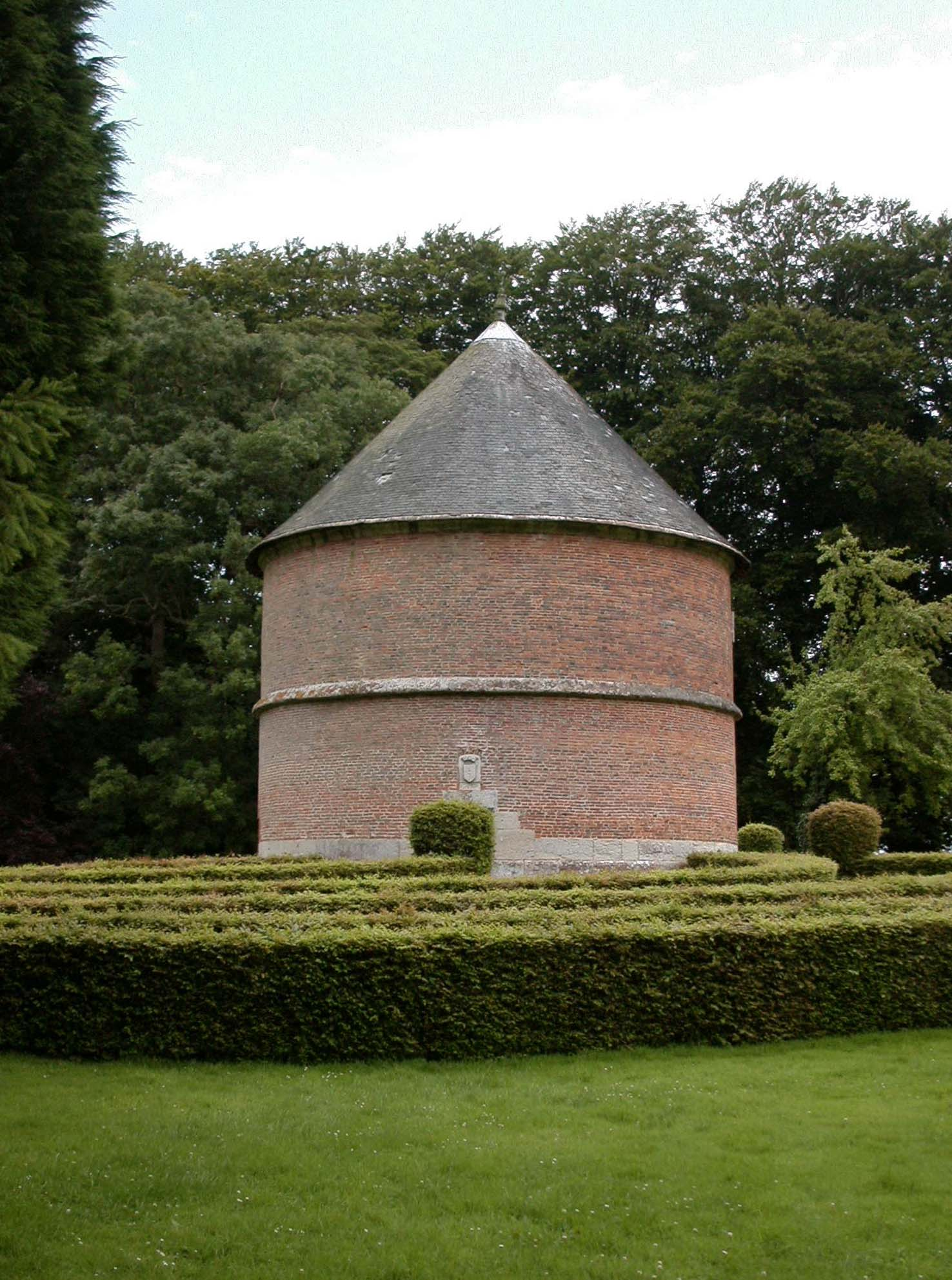 Taubenturm am Schloss Bailleul, Normandie Datum: 04.2005 Urheber: M. Pfeiffer alias Benutzer:Gordito1869 Quelle: privates Fotoarchiv des Urhebers